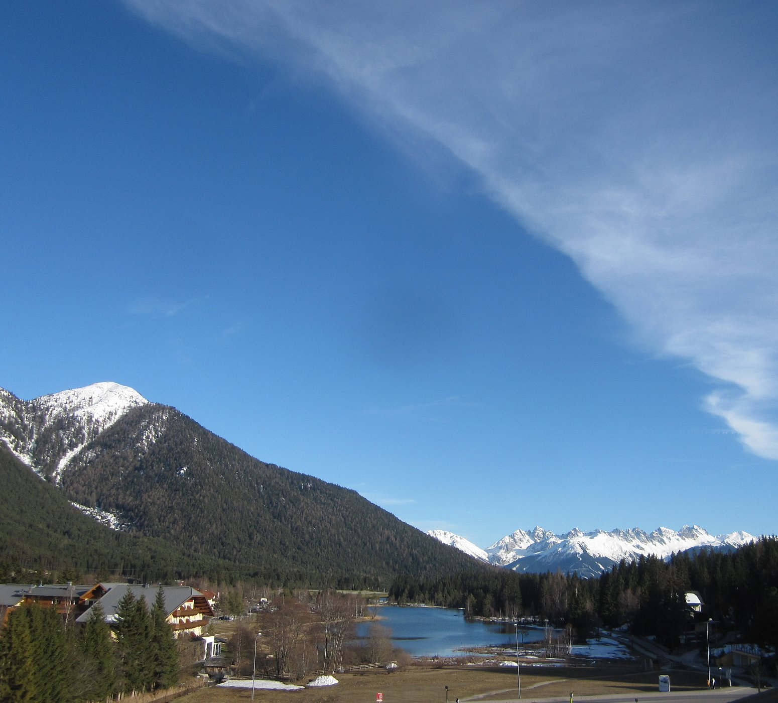 Wildsee bei Seefeld in Tirol - Wildsee lake, Seefeld (Tirol)